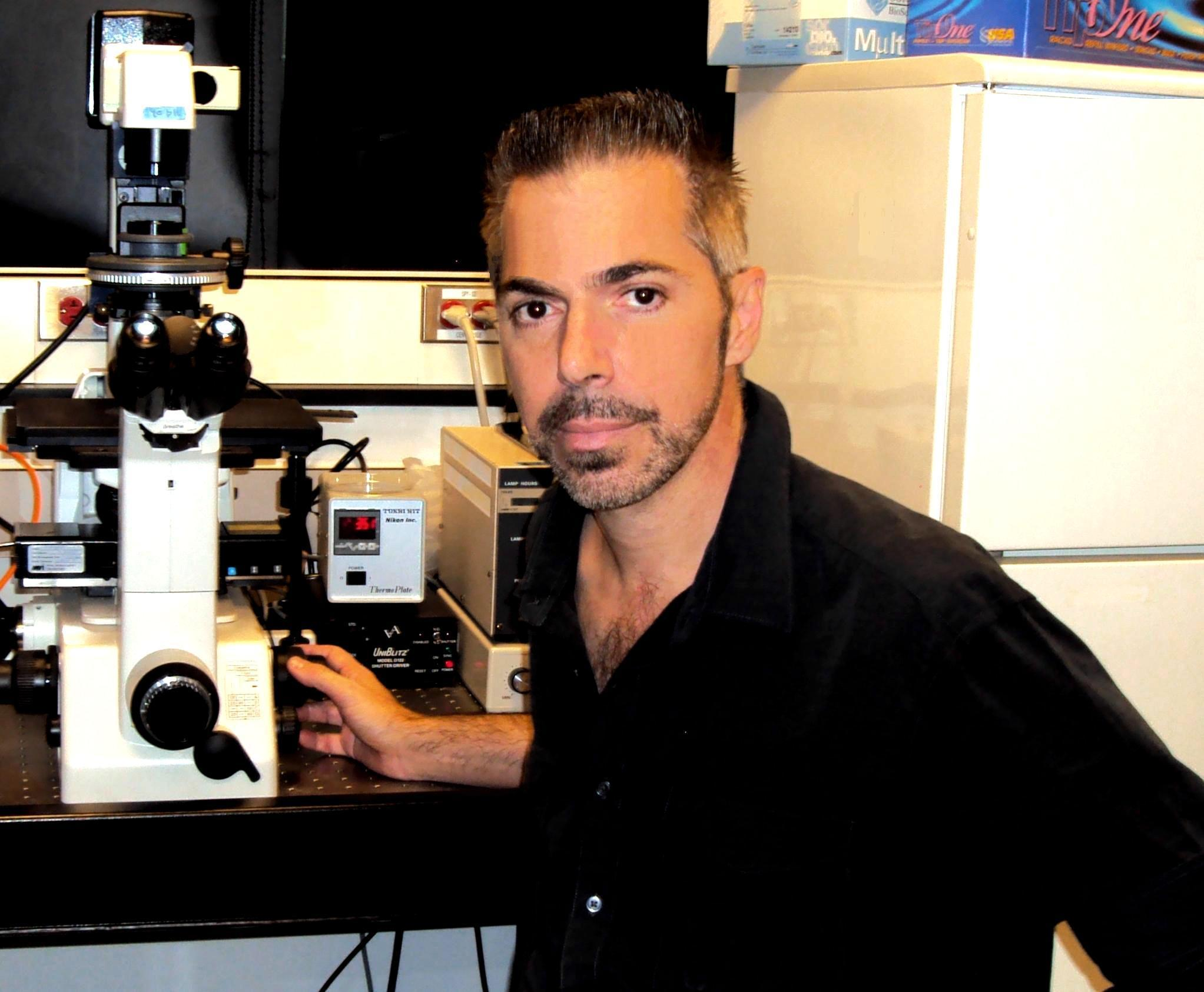 Robert Lanza